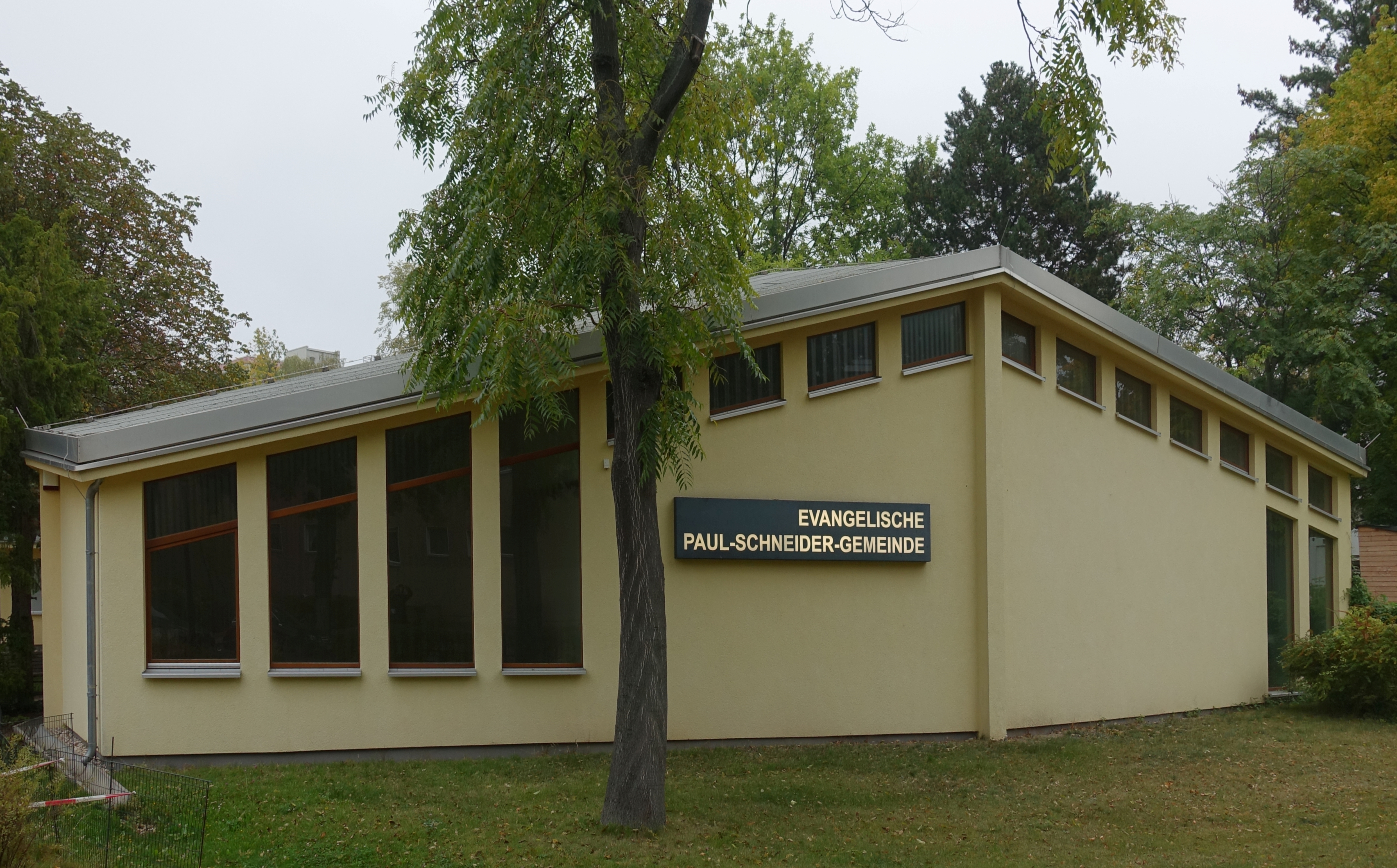 Der Gebäudeteil mit dem Kirchsaal